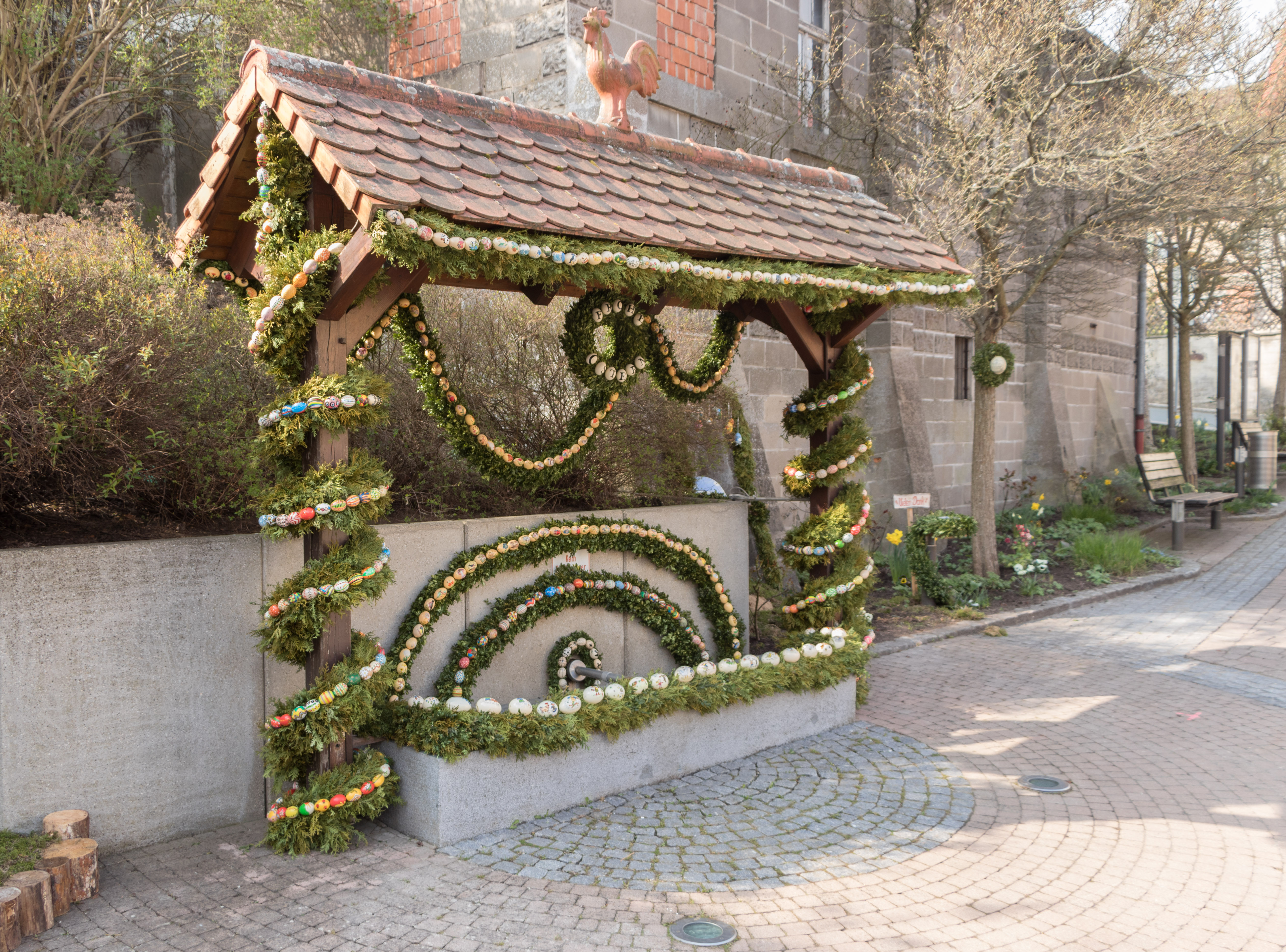 Osterbrunnen, Großgeschaidt, 2018